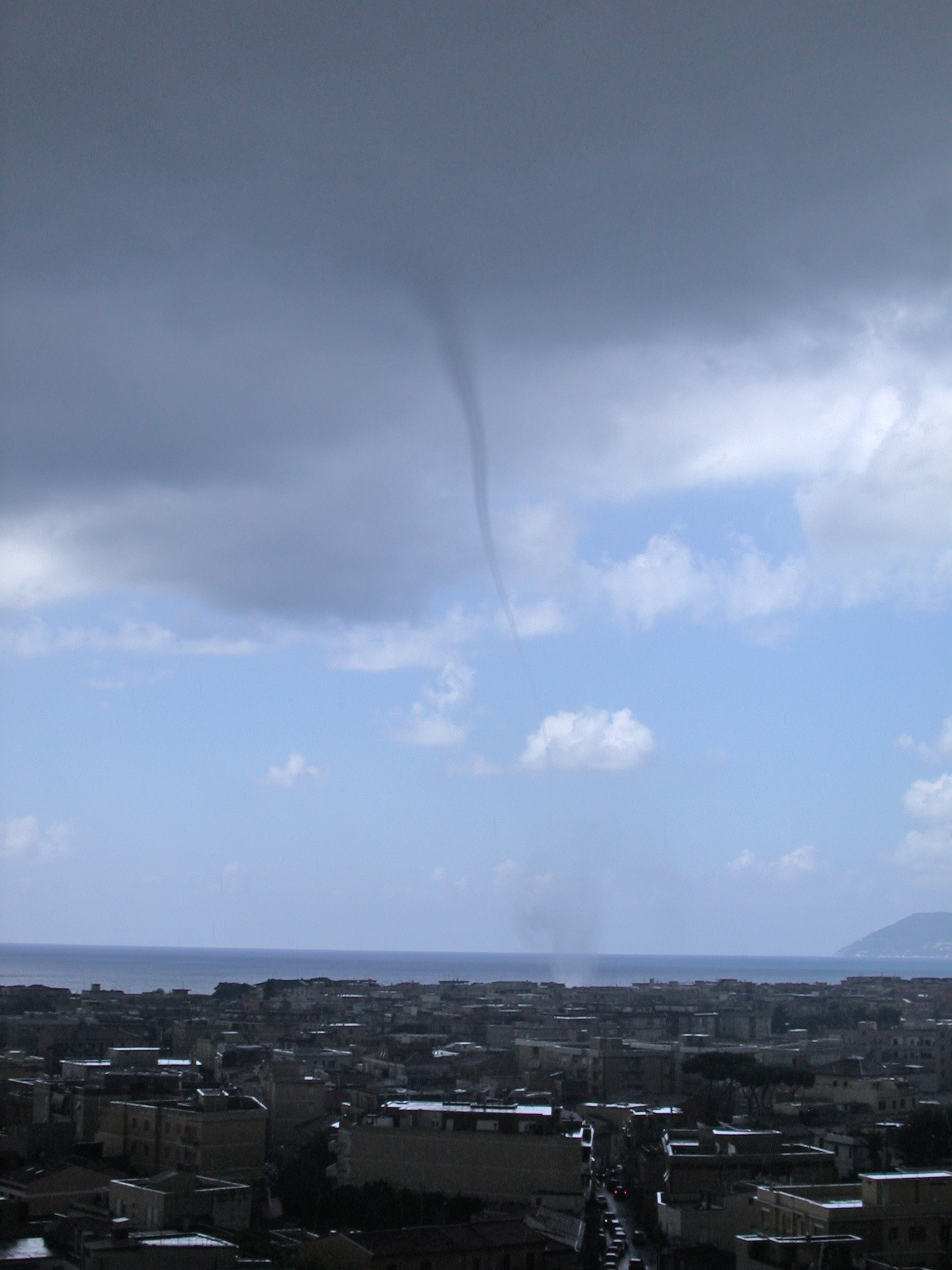 Tromba d'aria sul mare davanti a Terracina (Lazio, Italia)